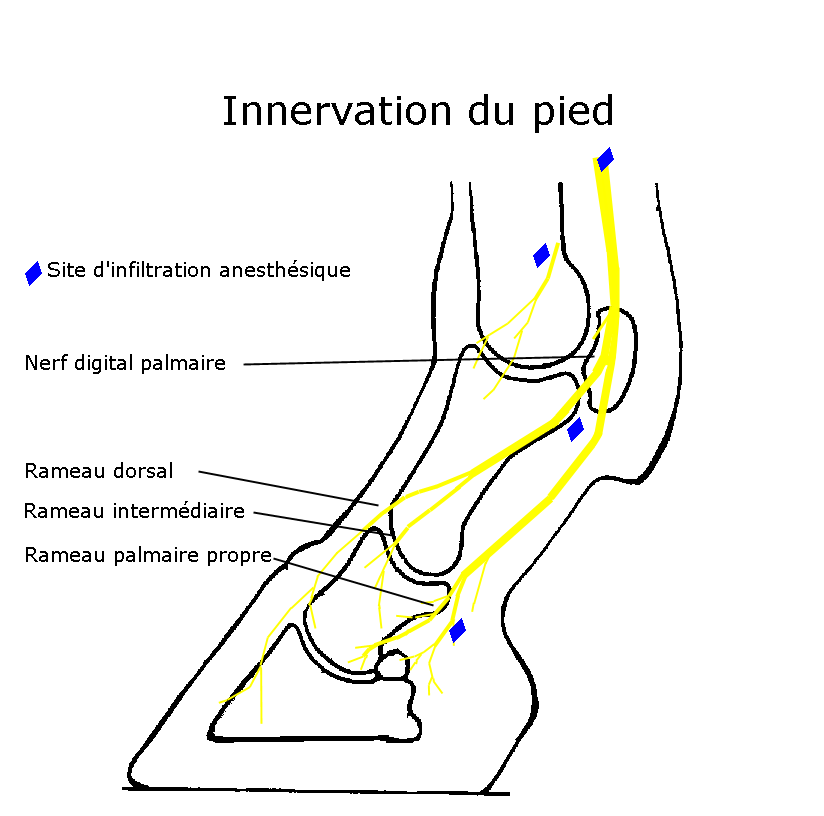 schéma de l'innervation du pied du cheval Auteur Bigomar Licence CC BY SA